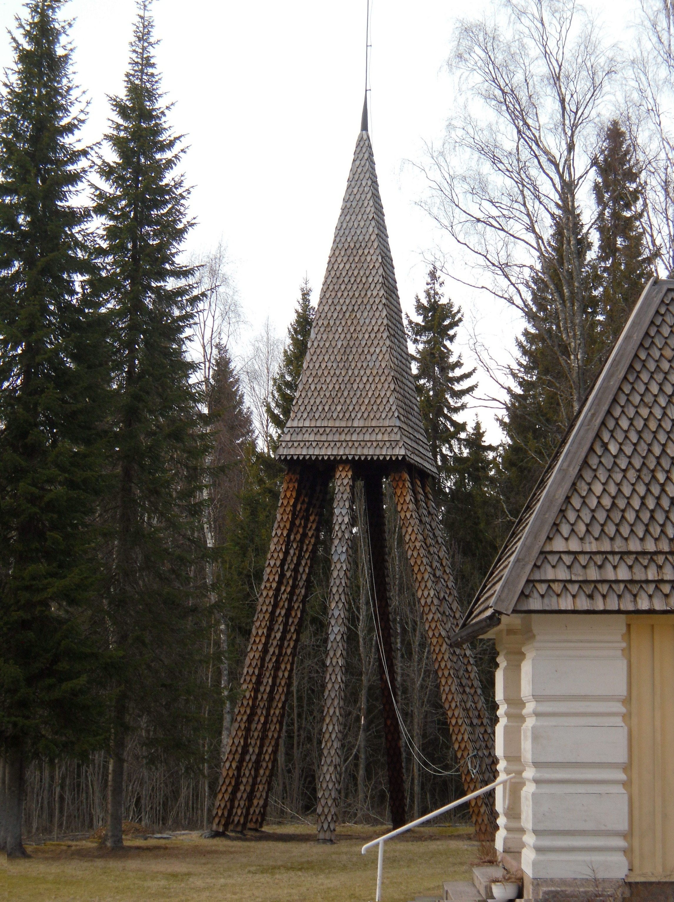 Ylöjärven seurakunnan Aurejärven kirkon kellotapuli